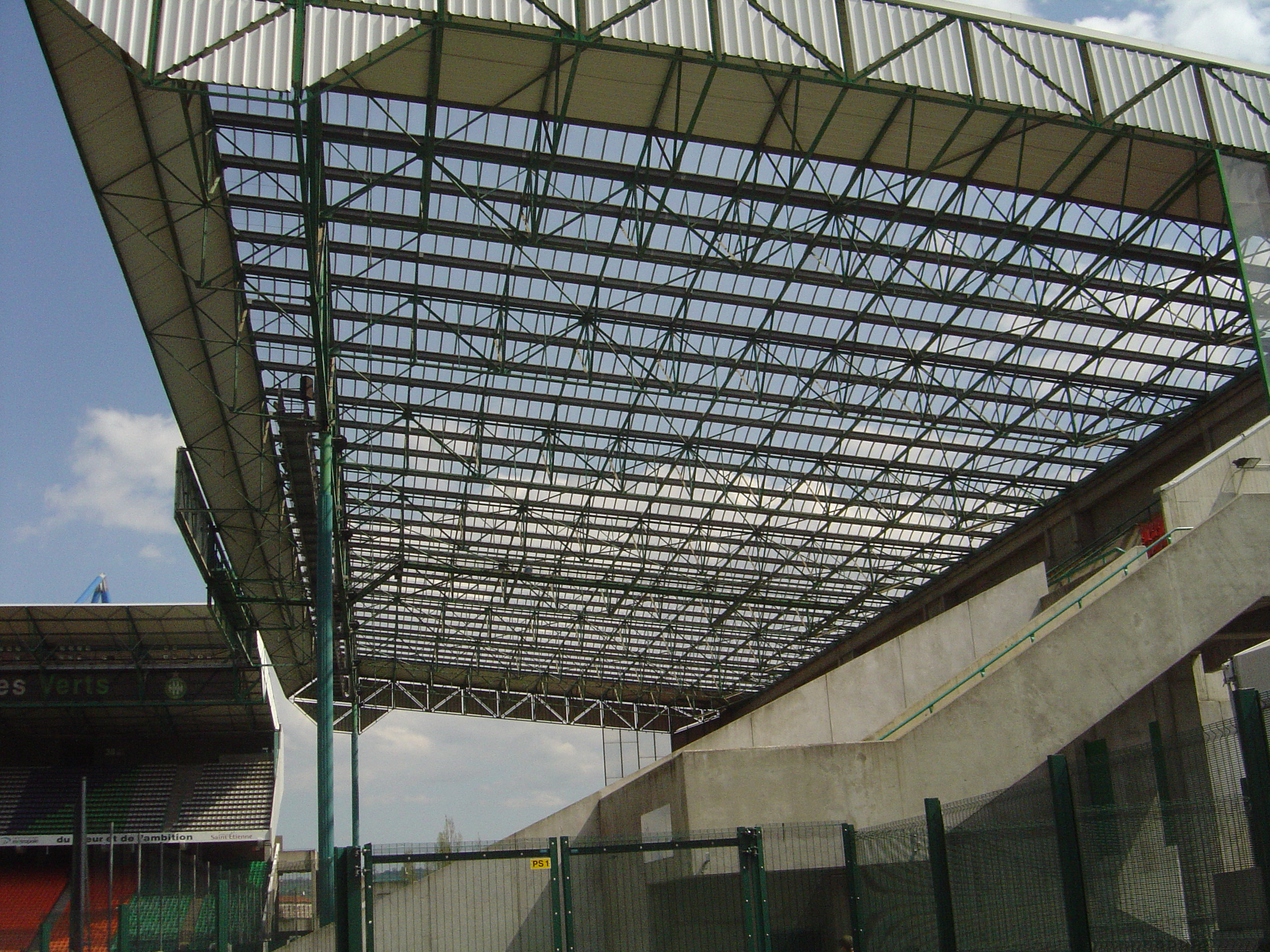 Zoom sur le toit en verre du KOP SUD (Tribune Jean Snella de Geoffroy-Guichard).